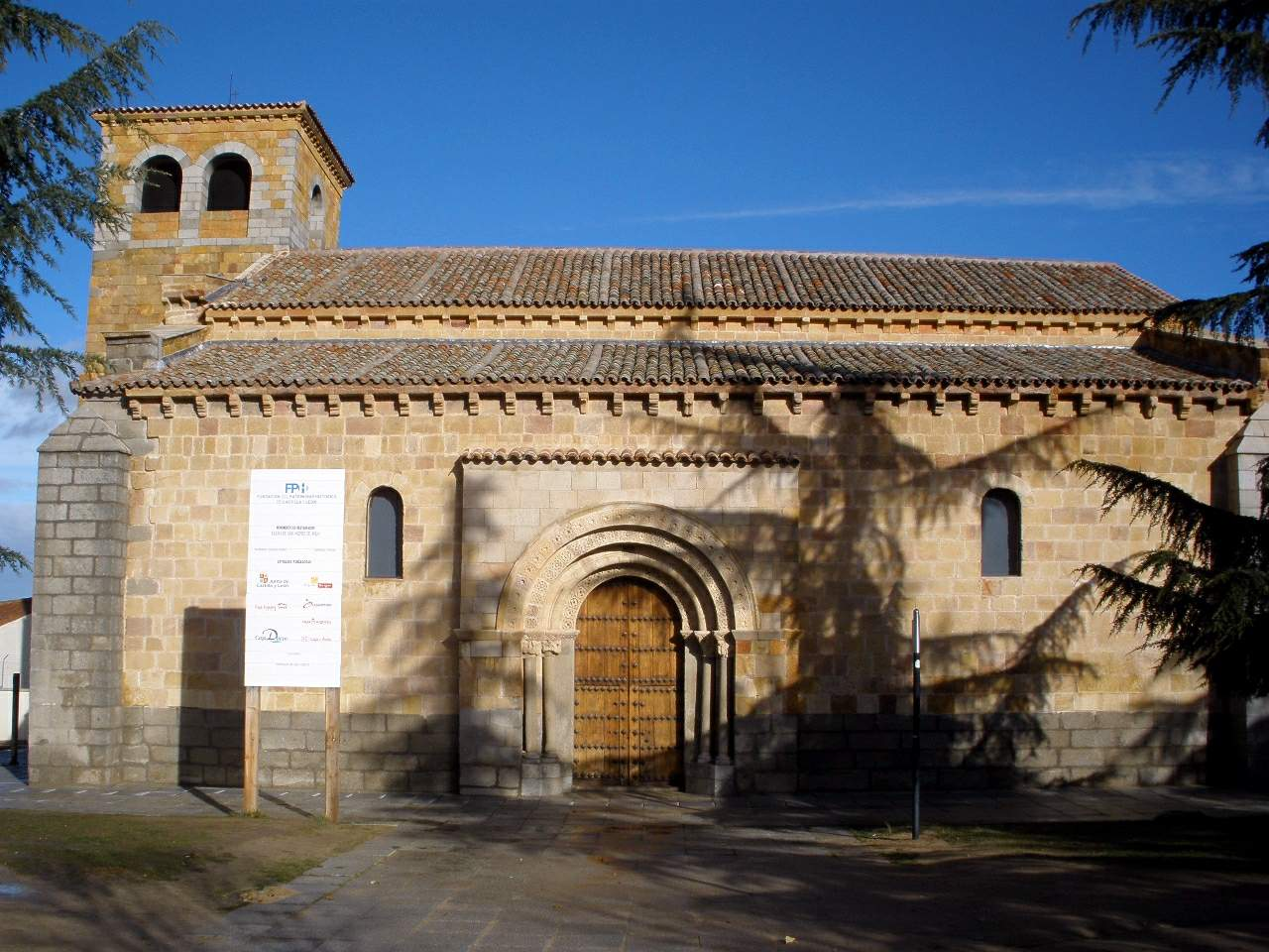 Church of San Andrés, Ávila